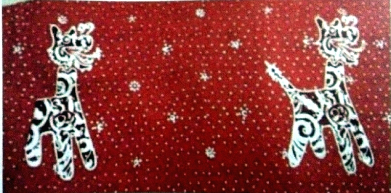 Warna dasar oranye kemerahan pada bathik Semarang yang merupakan pengaruh kebudayaan Tiongkok dan Eropa